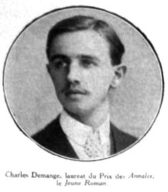 Charles Demange, écrivain (1884-1909)